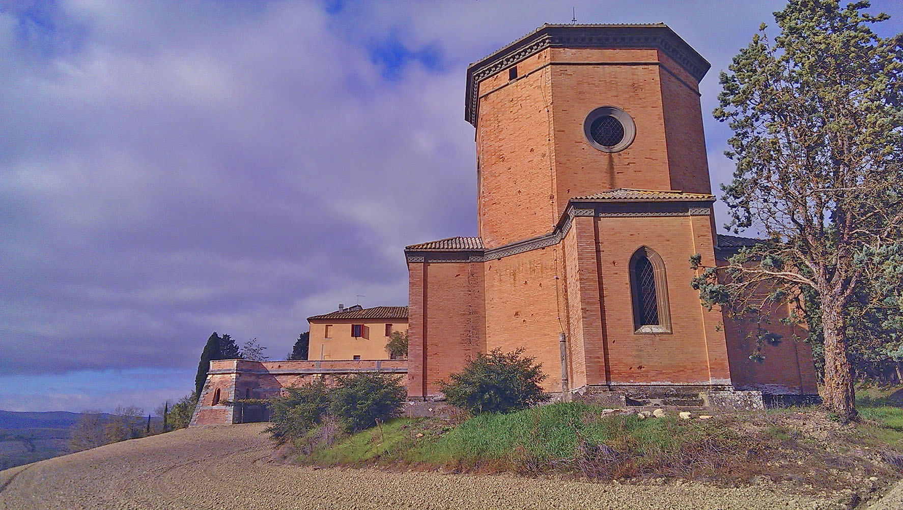 Vista della cappella Pieri Nerli, lato orientale con le tre cappelle laterali e, sullo sfondo le opere di sostruzione